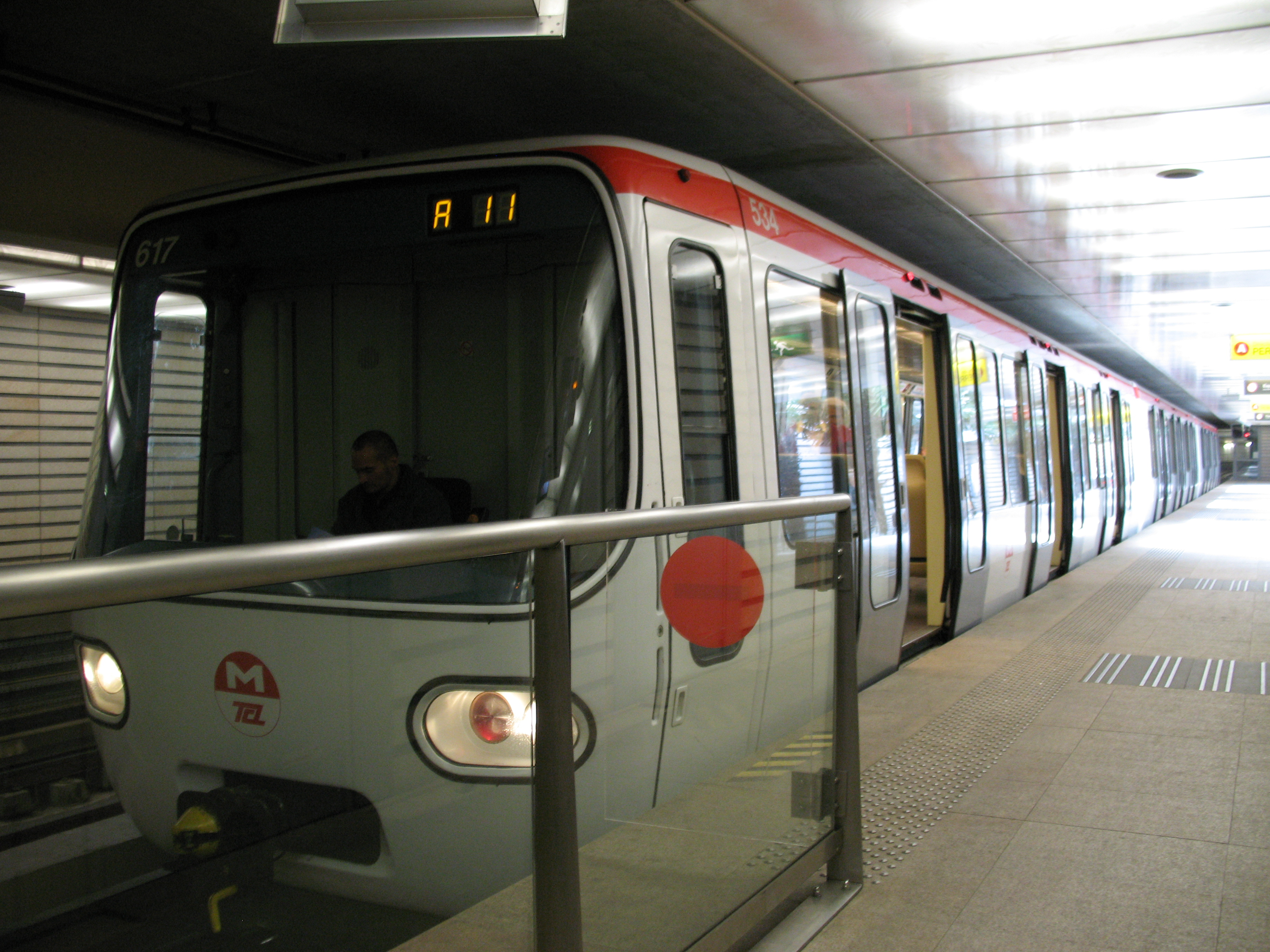 Rame MPL75 sur la ligne A du métro de Lyon à Vaulx-en-Velin La Soie.